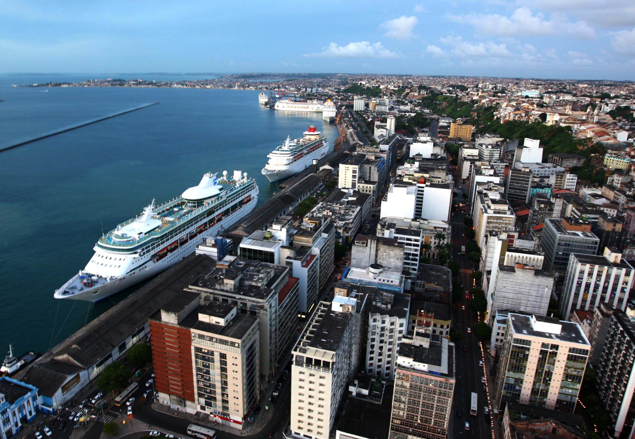 Salvador - Turismo no Carnaval 2010